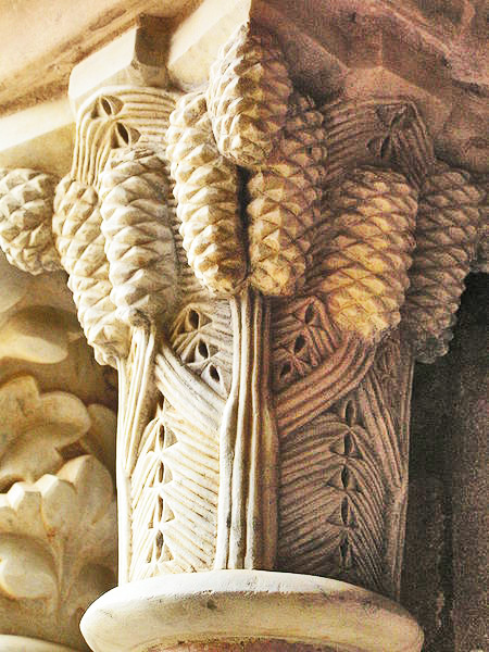 Abbaye de Fontfroide, Kreuzgangkapitell